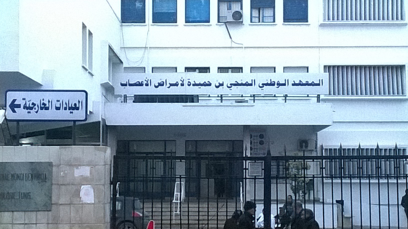 Tunis تونس